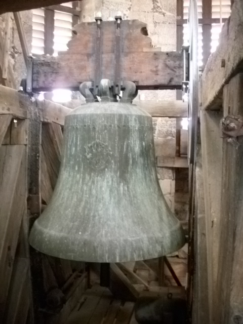 St. Cyriakus, Duderstadt: Marienglocke im Nordturm. Gegossen von Otto, Hemelingen, 1950.